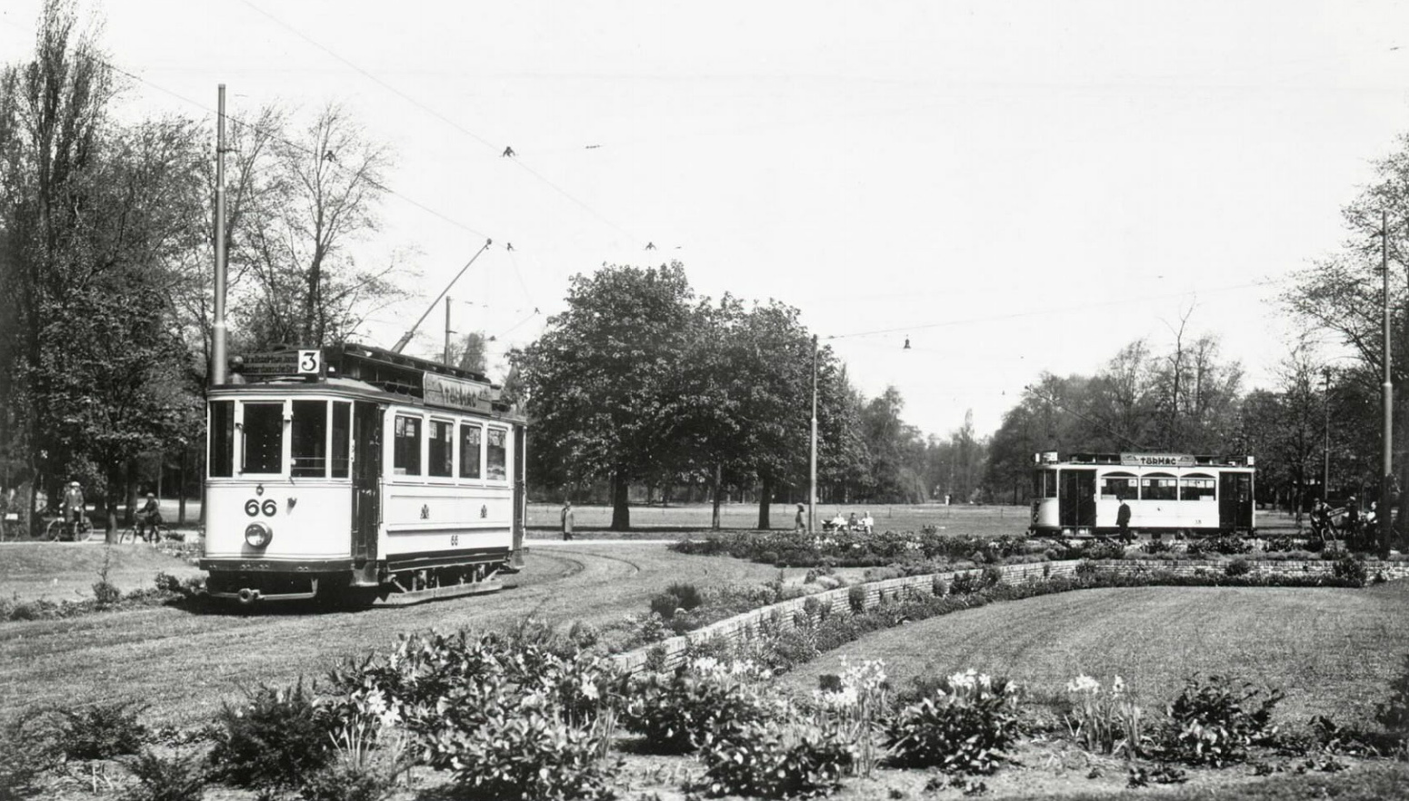 Foto van motorwagen 66 en 38 van de Gemeentetram Utrecht in het Wilhelminapark. Vervaardiger onbekend. Gelet op artikel 38 van de Auteurswet 1912 en de nadere invulling daarvan zoals verduidelijkt onder punt 1.1.5.12 van de Juridische wegwijzer archieven en musea online en de discussie hier is het auteursrecht op deze afbeelding vervallen vanaf 1 januari 2004.